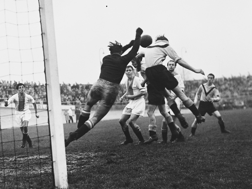 DOS tegen Ajax 0-1. Doelman Ad Visser in actie.